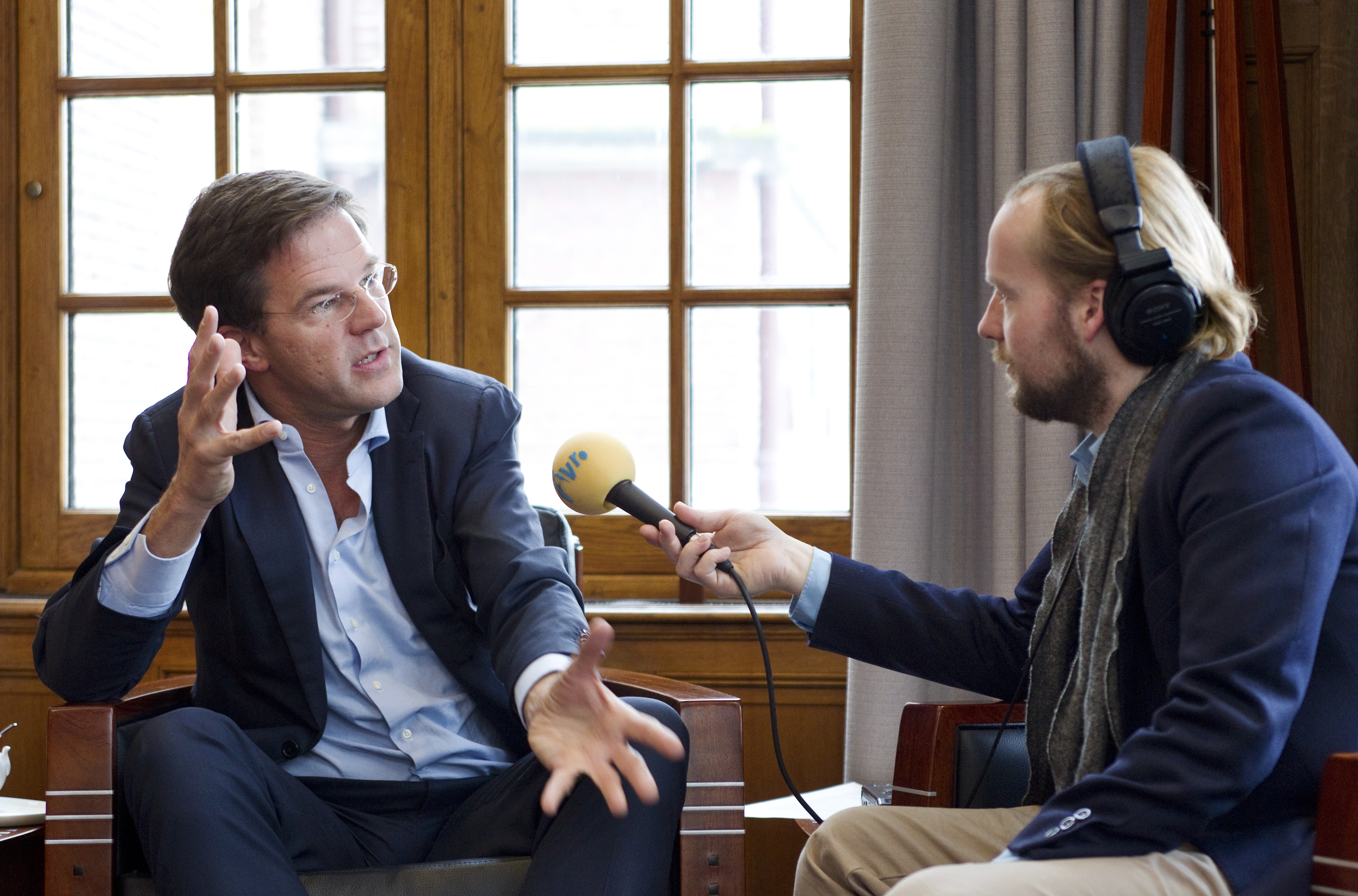 Minister-president Rutte vertelt over zijn favoriete klassieke muziek tijdens een interview met Radio 4 voor het programma De Klassieken. Zijn top vijf bestaat uit werken van Brahms, Mozart, Bach, Scarlatti en Schubert. Uitzending: 20 t/m 24 februari om 10.30 uur op Radio 4.